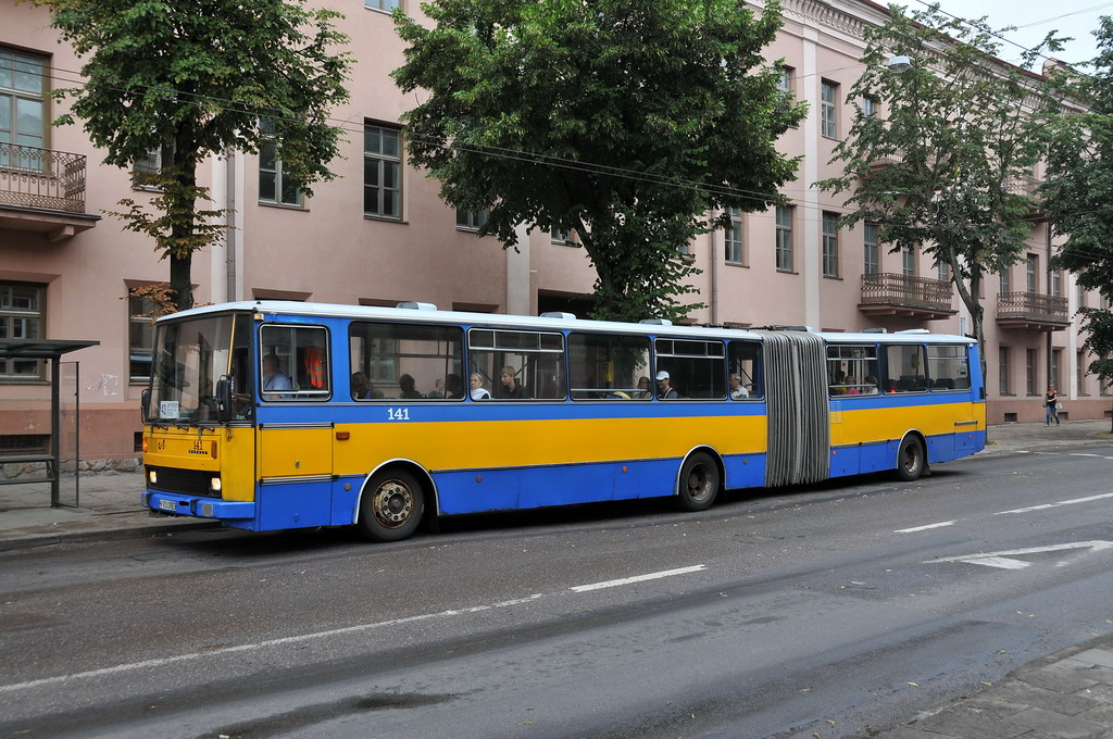 Pylimo g.